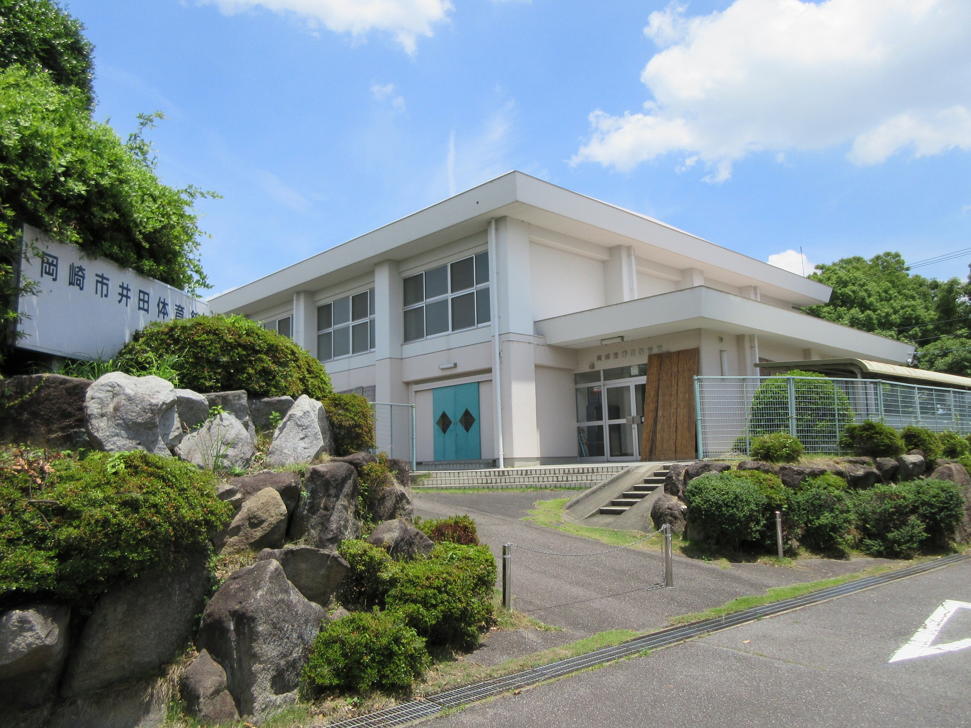 岡崎市井田体育館（岡崎市伊賀新町）